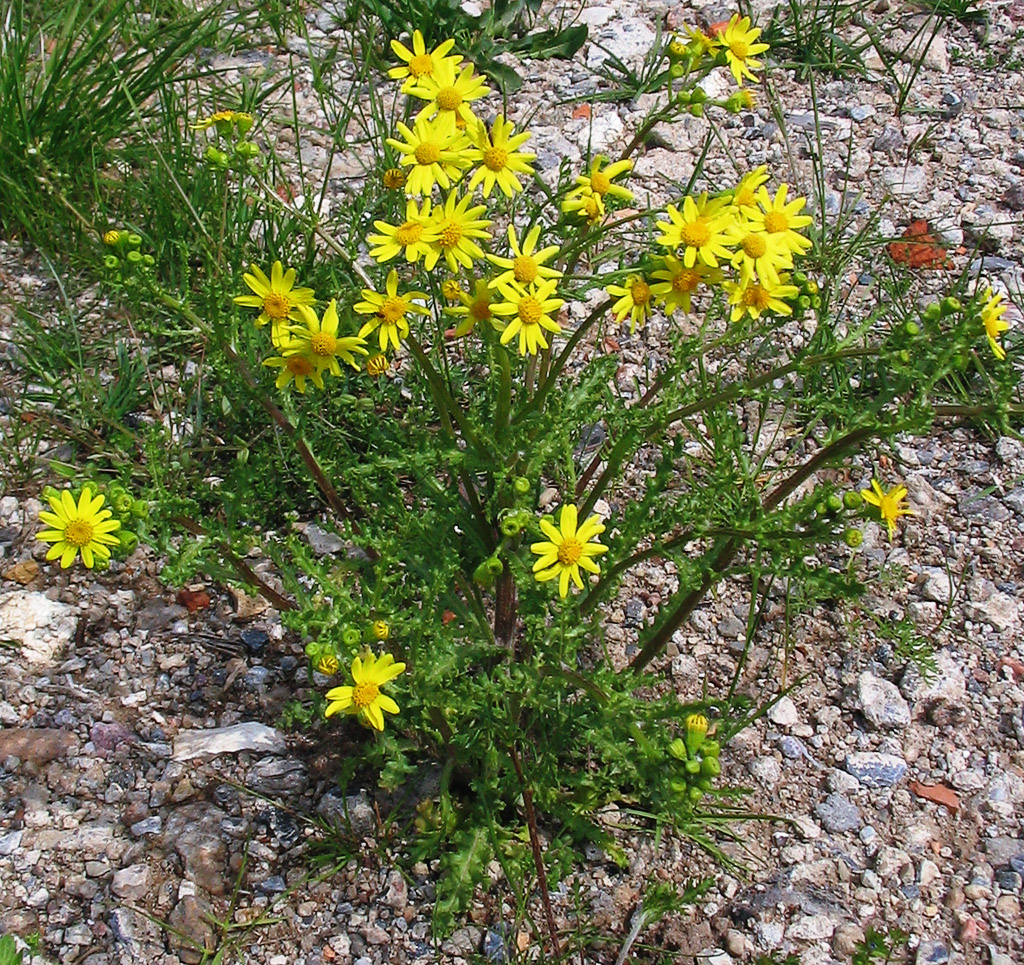 Beschreibung: Frühlings-Greiskraut (Senecio_vernalis) Fotograf: Darkone, 14. Mai 2005